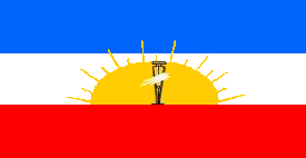 Imagen con mejor resolución